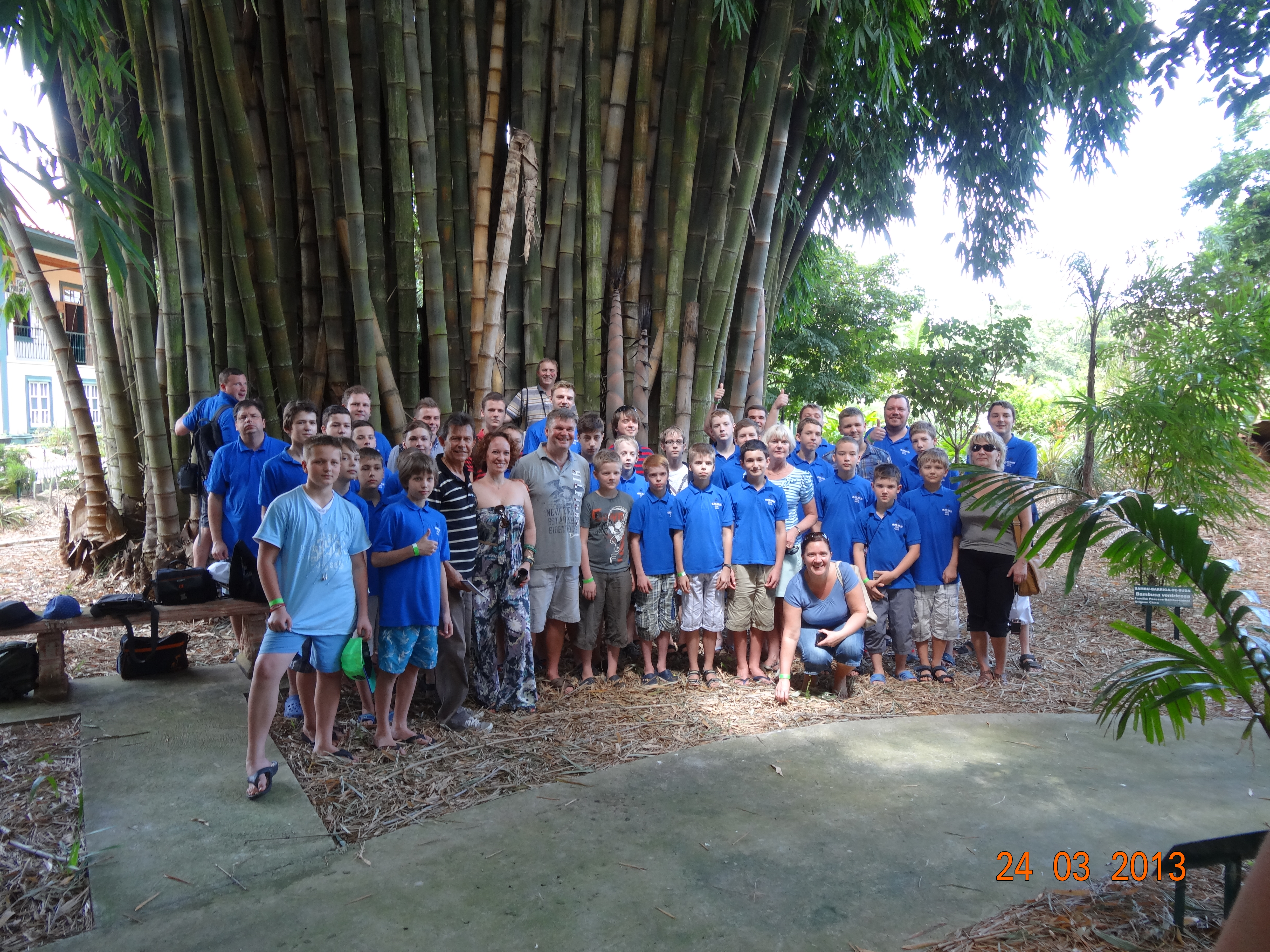 Nova Odessas botāniskā dārza apmeklējums Jāzepa Mediņa Rīgas 1. mūzikas skolas zēnu kora Brazīlijas turnejas laikā